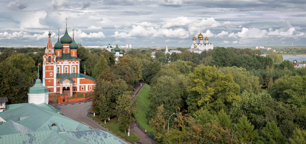 Церкви в Ярославле